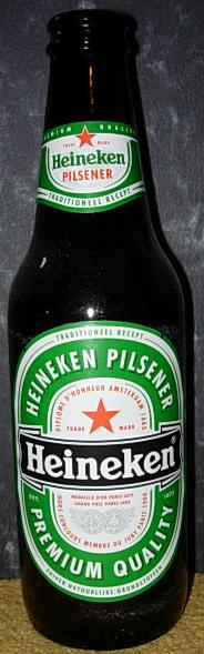 Bierflesje Heineken